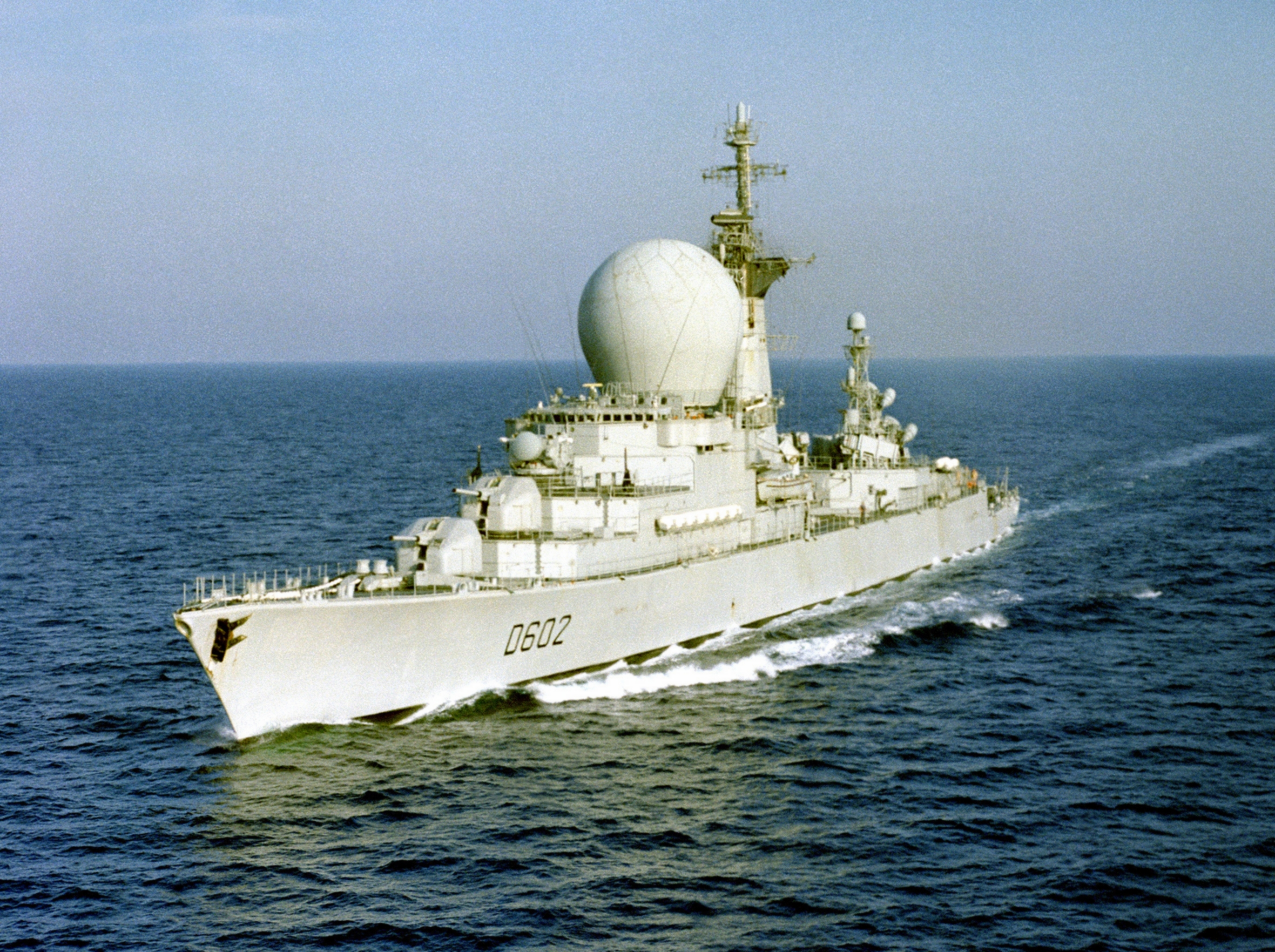 The French destroyer Suffren (D602) underway during exercise "Distant Drum", in 1983.